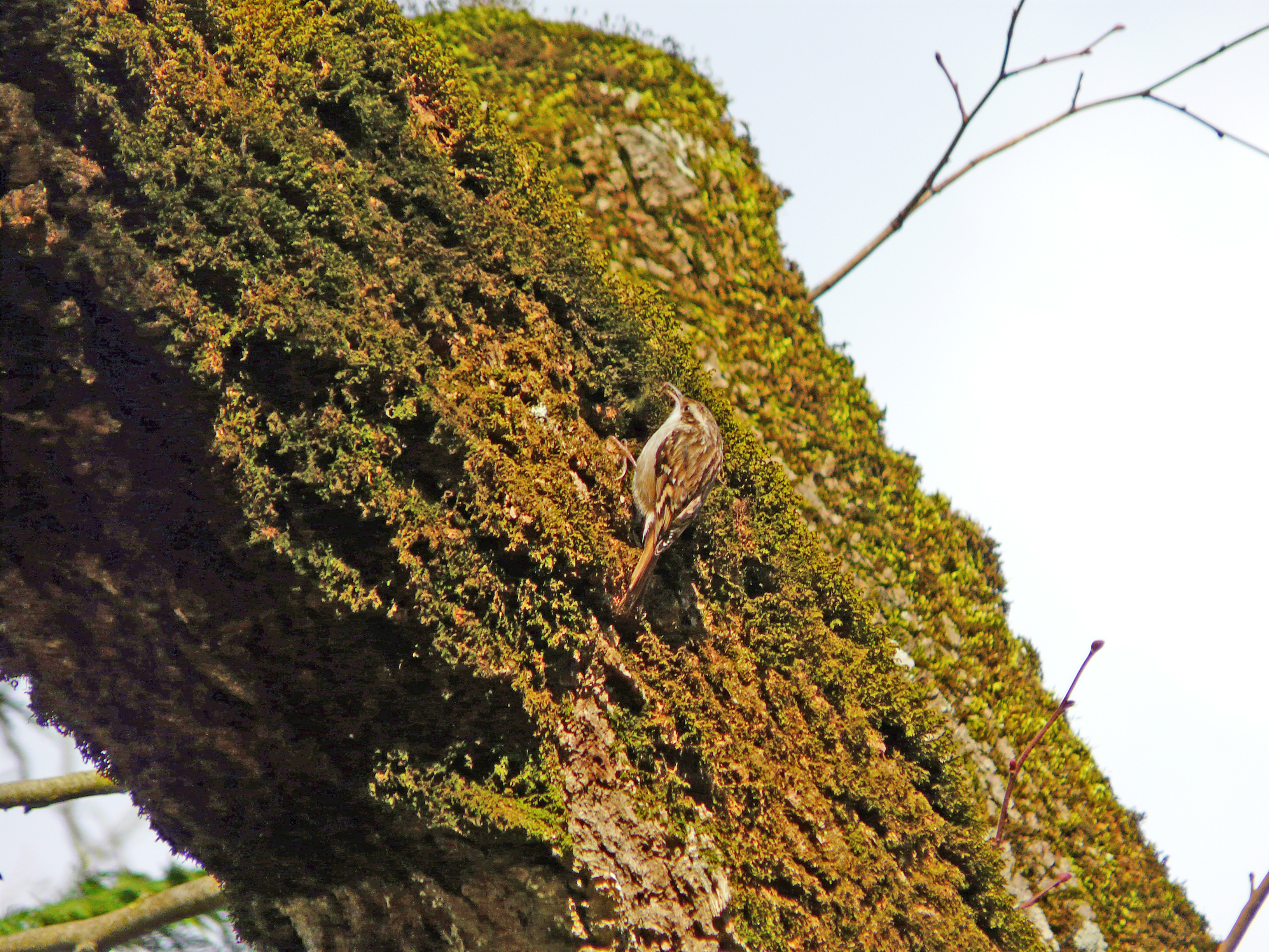 Grimpereau des jardins Certhia brachydactyla à Leygonie, Montagnac-la-Crempse, Dordogne, France.